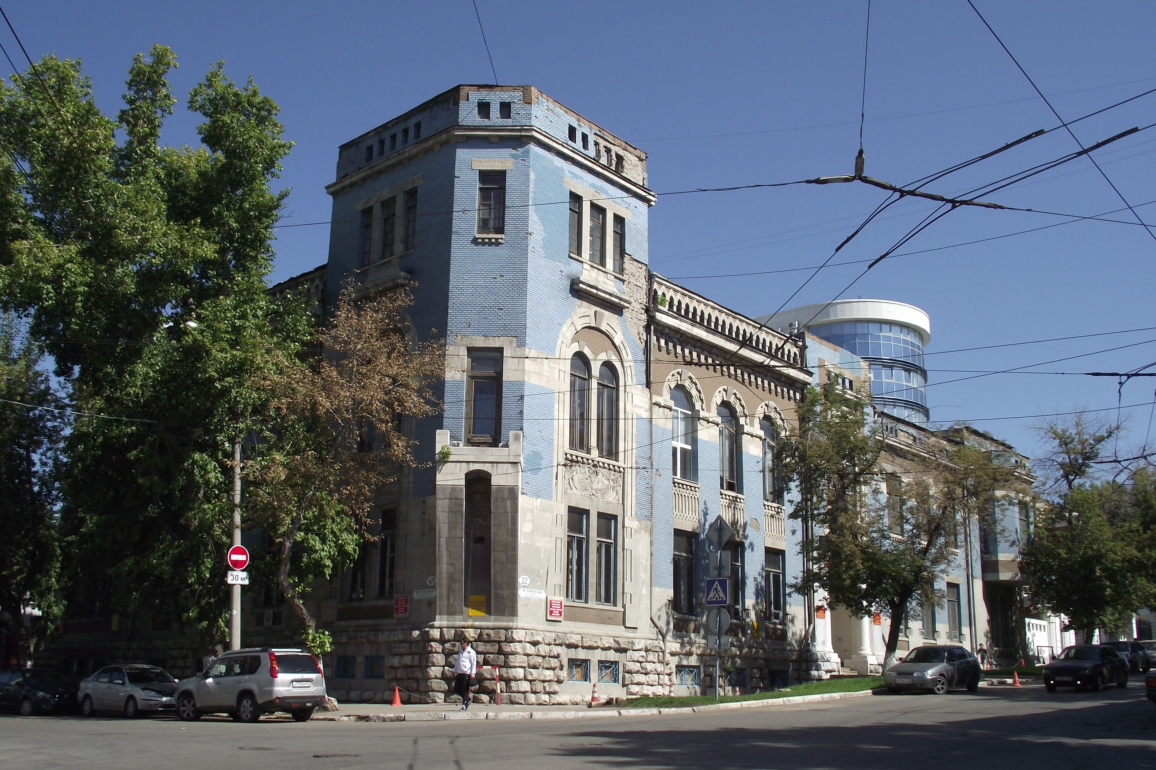 Особняк Сурошникова (Самарская область, Самара, Пионерская улица, 22)